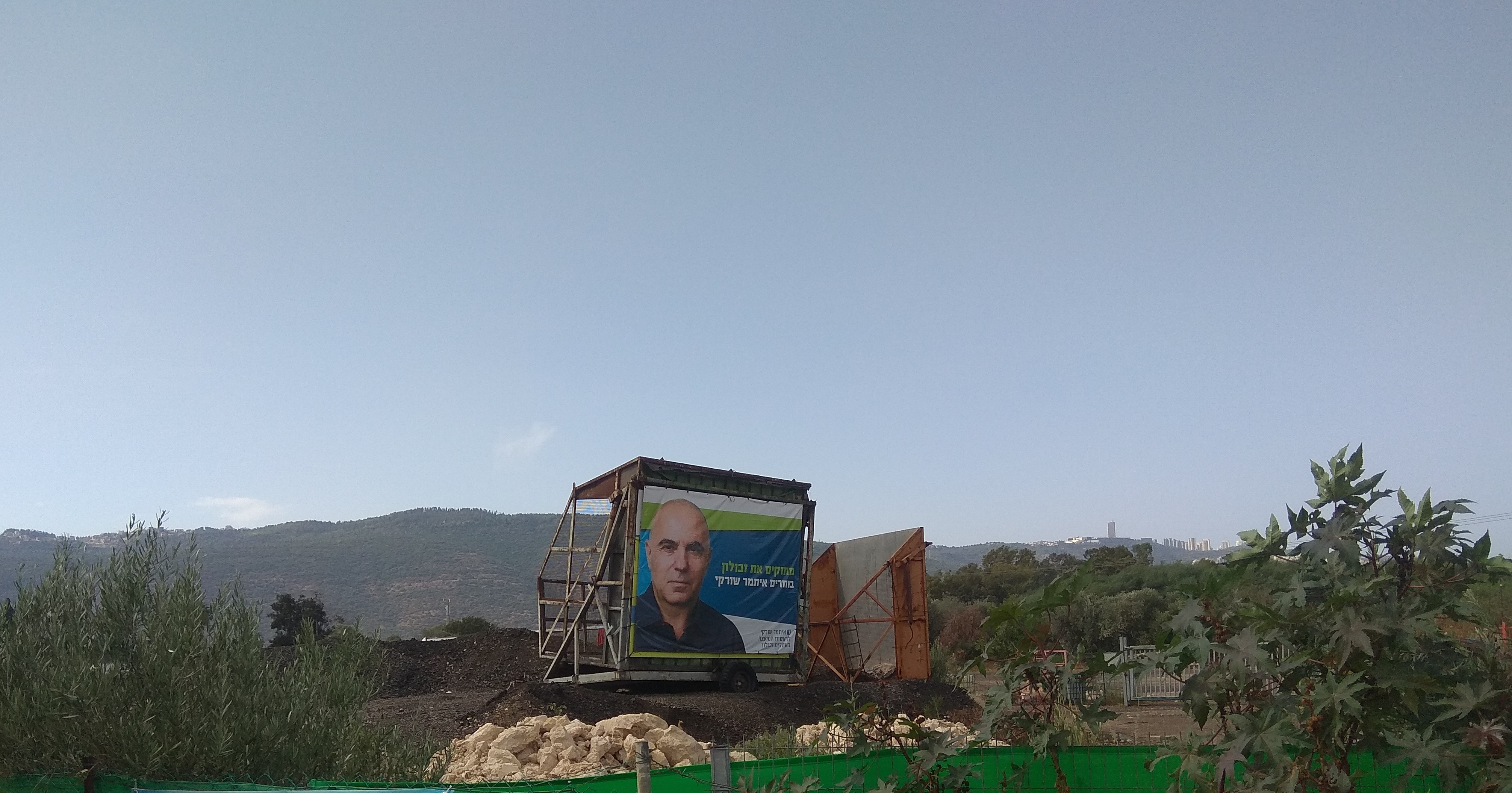 שלט תמיכה במועמד איתמר שורקי